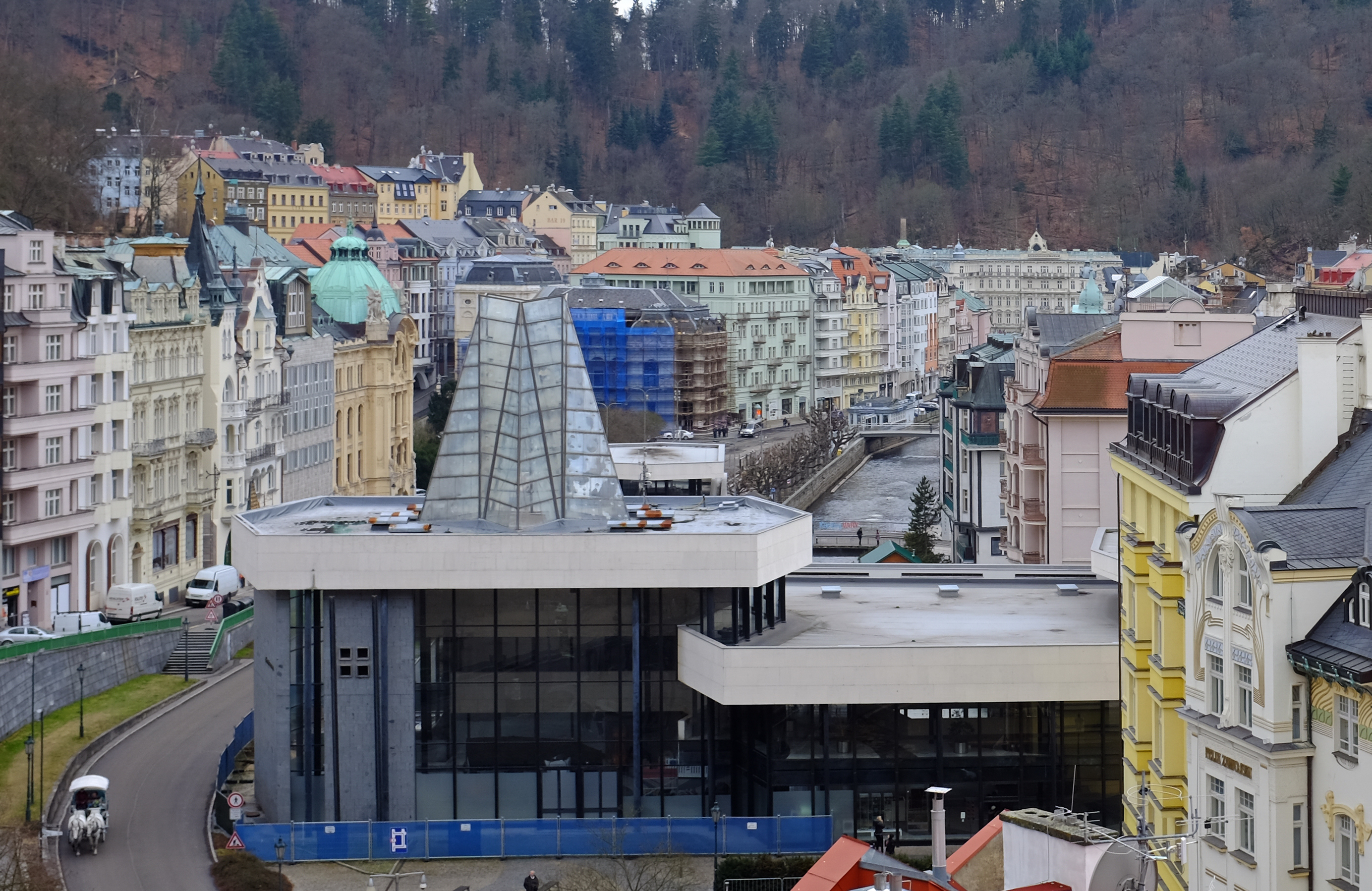 Karlovy Vary, vřídelní kolonáda